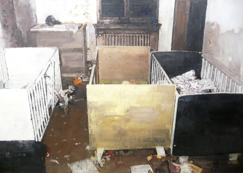 Heike Ruschmeyer, Lalelu 17, 2011, Öl auf Leinen, 169 x 240 cm